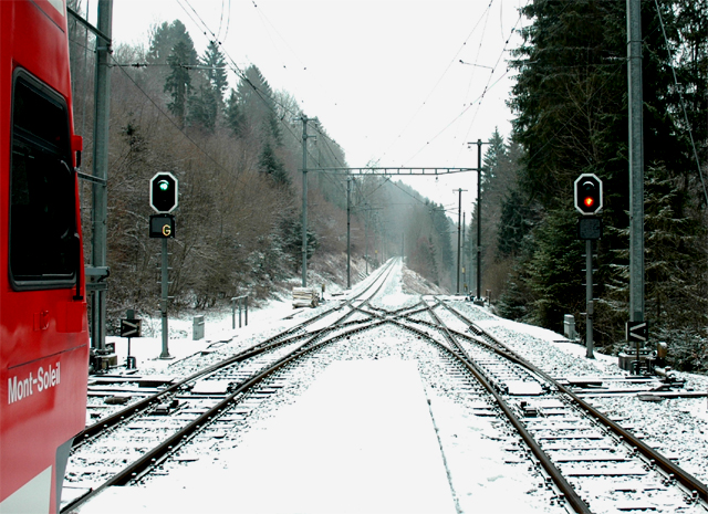 Chemins de fer du Jura (CJ) treinstel ABe 632 Mont-Soleil op 25 februari 2006 te Combe-Tabeillon. Dit is een kopstation. Het rechter spoor gaat naar Glovelier en het linker spoor gaat naar La Chaux-de-Fonds.